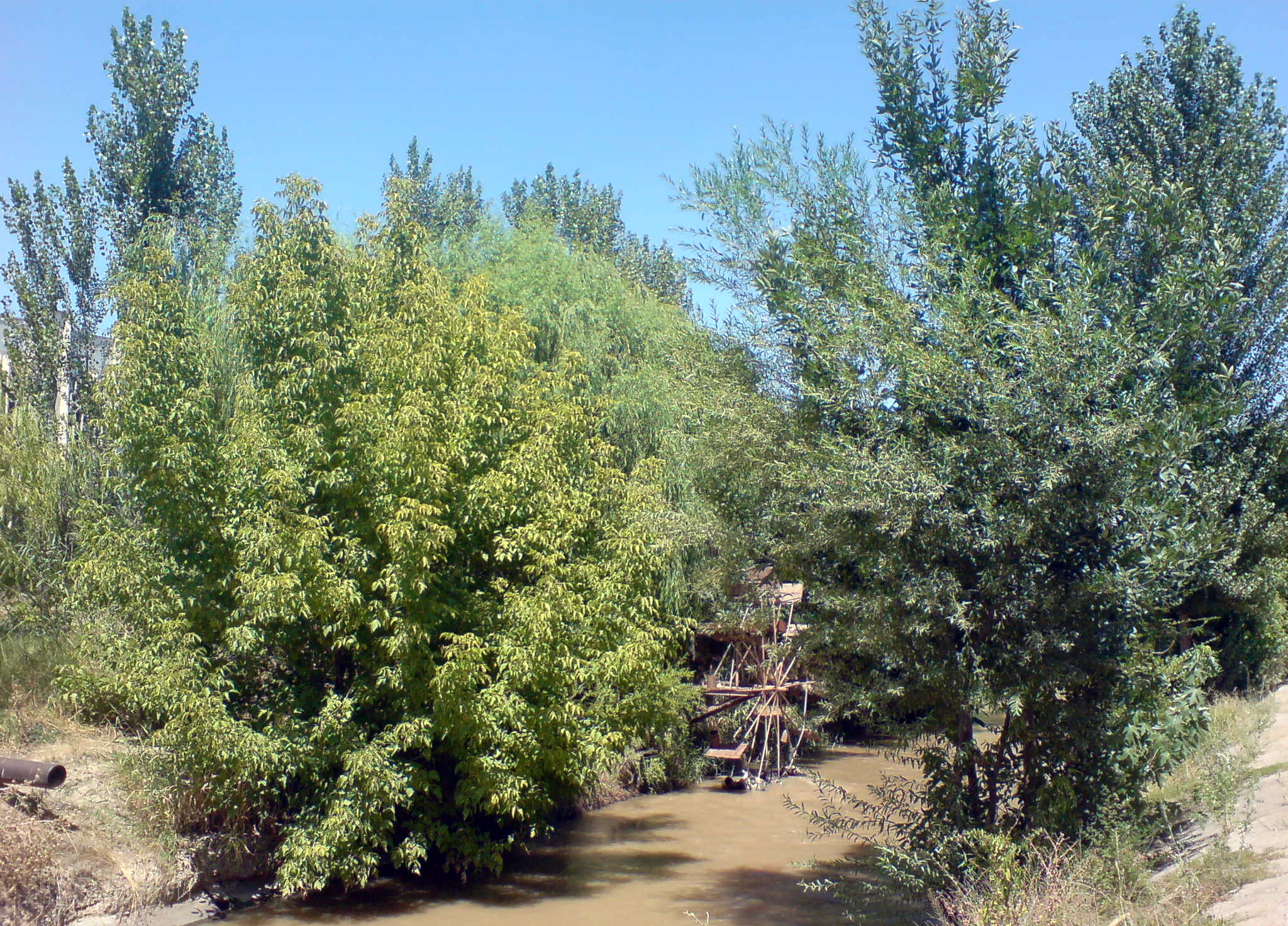 Макет чигиря (водоподъёмного устройства) на канале Каракамыш в районе завода "Зенит" (г. Ташкент)